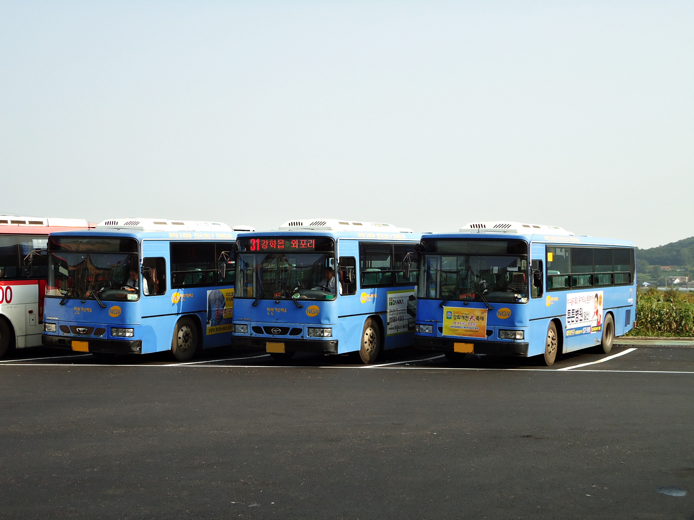 강화선진버스-강화도 군내버스 BS090 로얄미디.